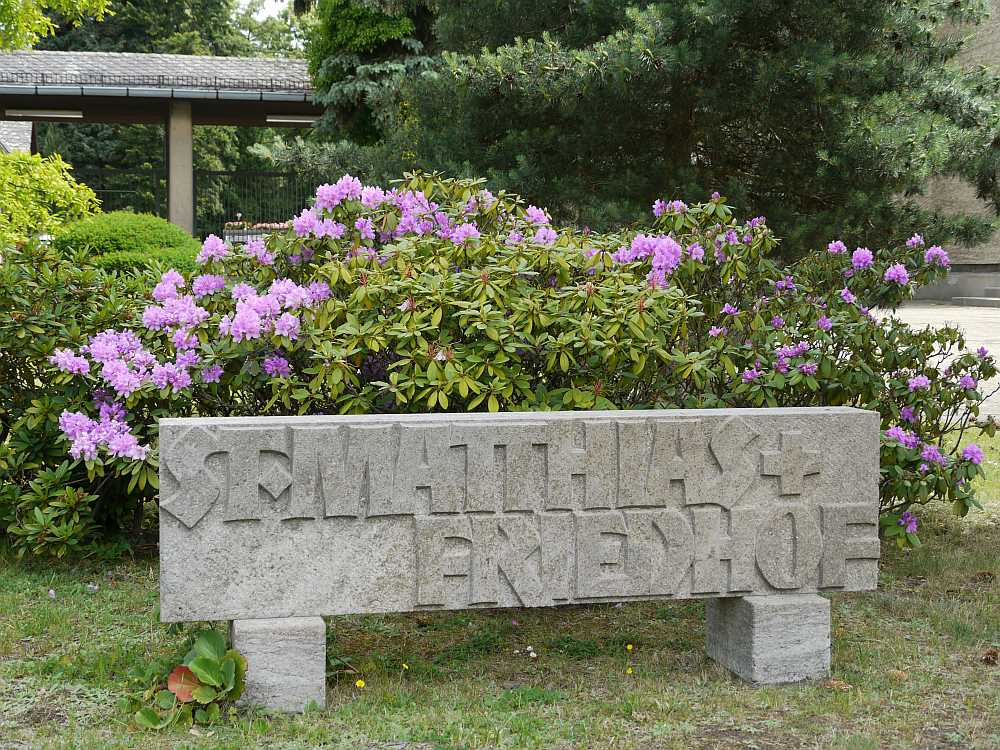 Steinerne Eingangstafel vor dem Sankt-Mattias-Friedhof in Berlin-Tempelhof